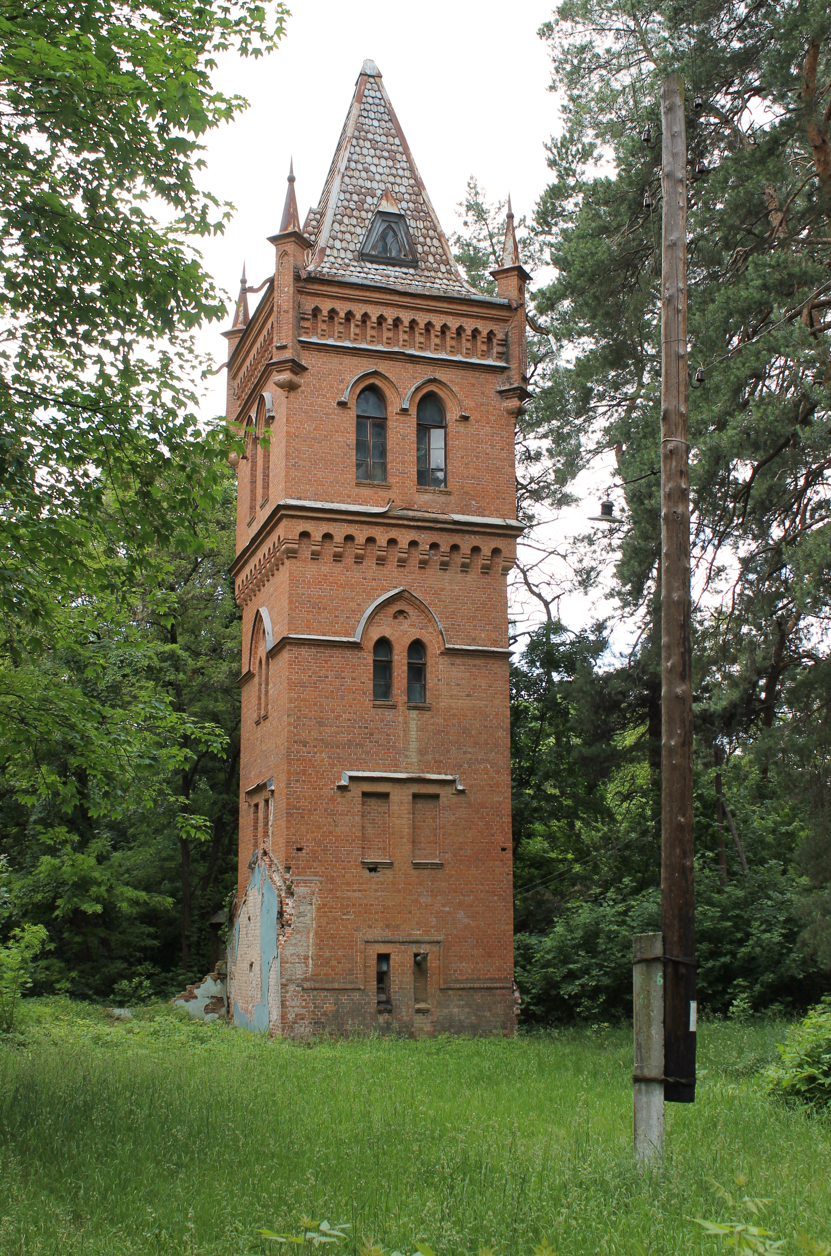 Водогінна вежа Наталіївської садиби Харитоненків; Краснокутський район; Харківська обл.